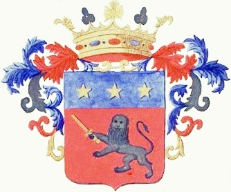 Brasão de Armas do Marechal Osorio, cópia do original de 1870